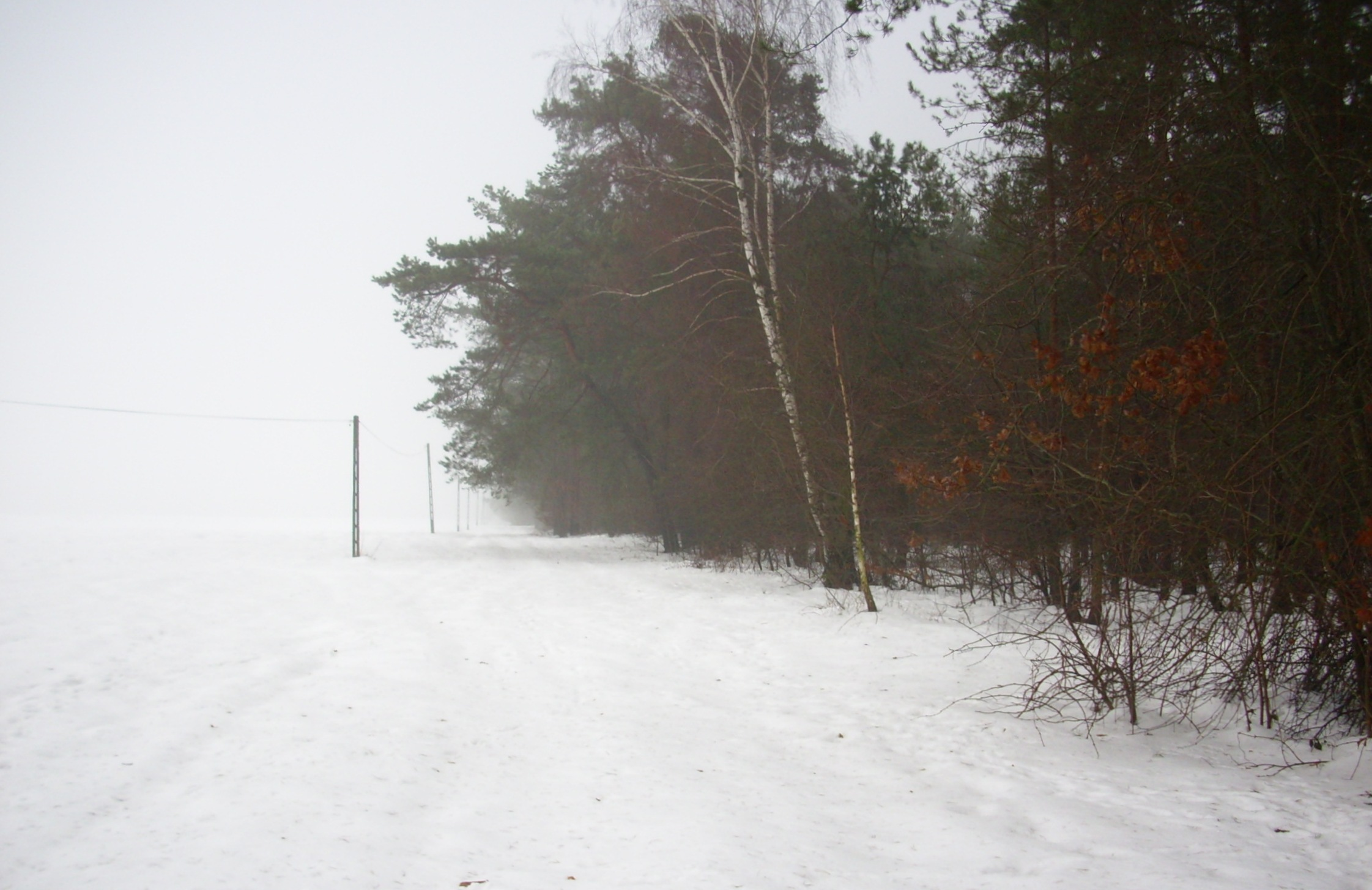 Leśna droga w okolicach Nowego Patoka (pow. łukowski, woj. lubelskie, Polska). Śnieżna zima.